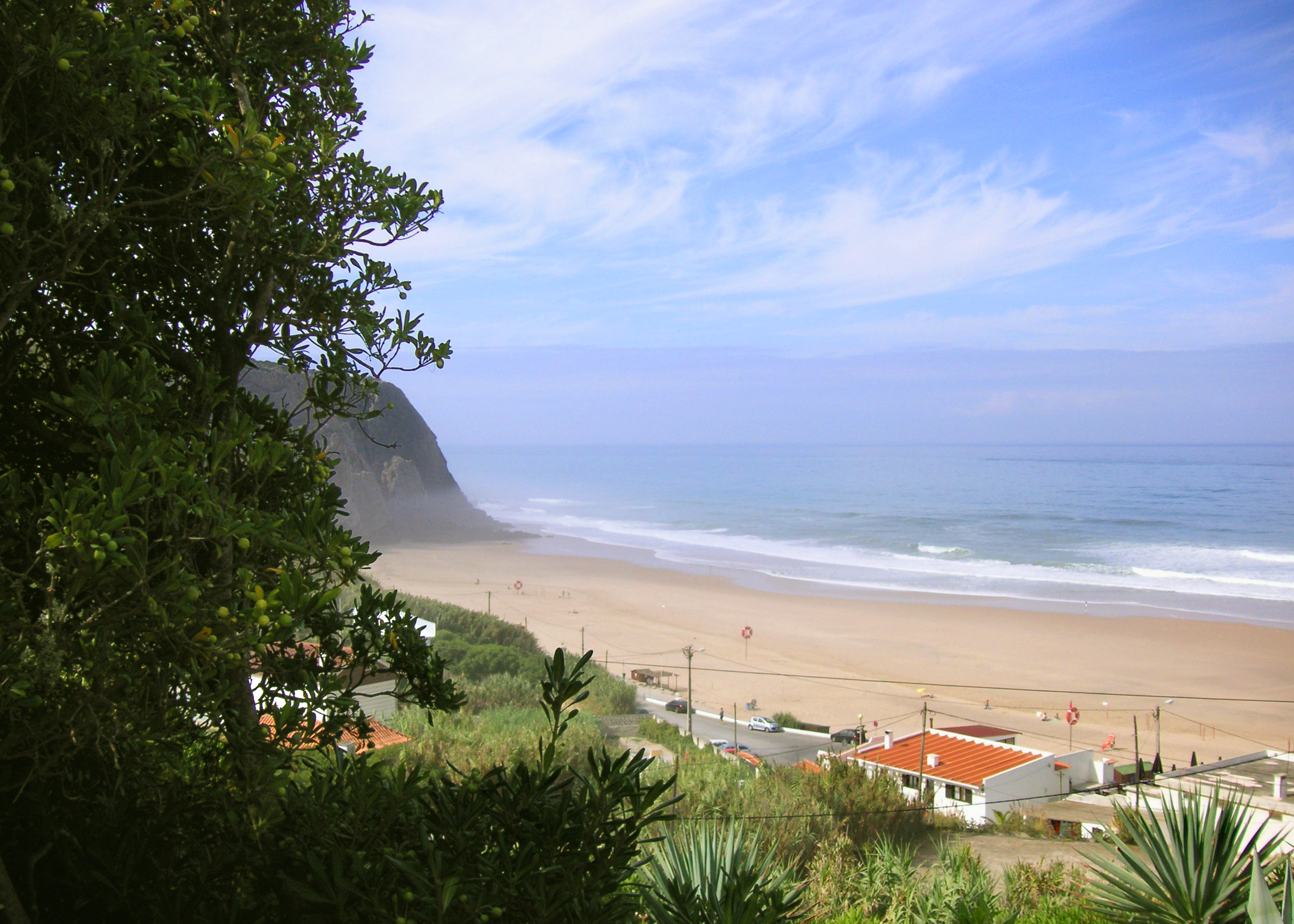 Praia Grande nahe Cabo da Roca, Portugal